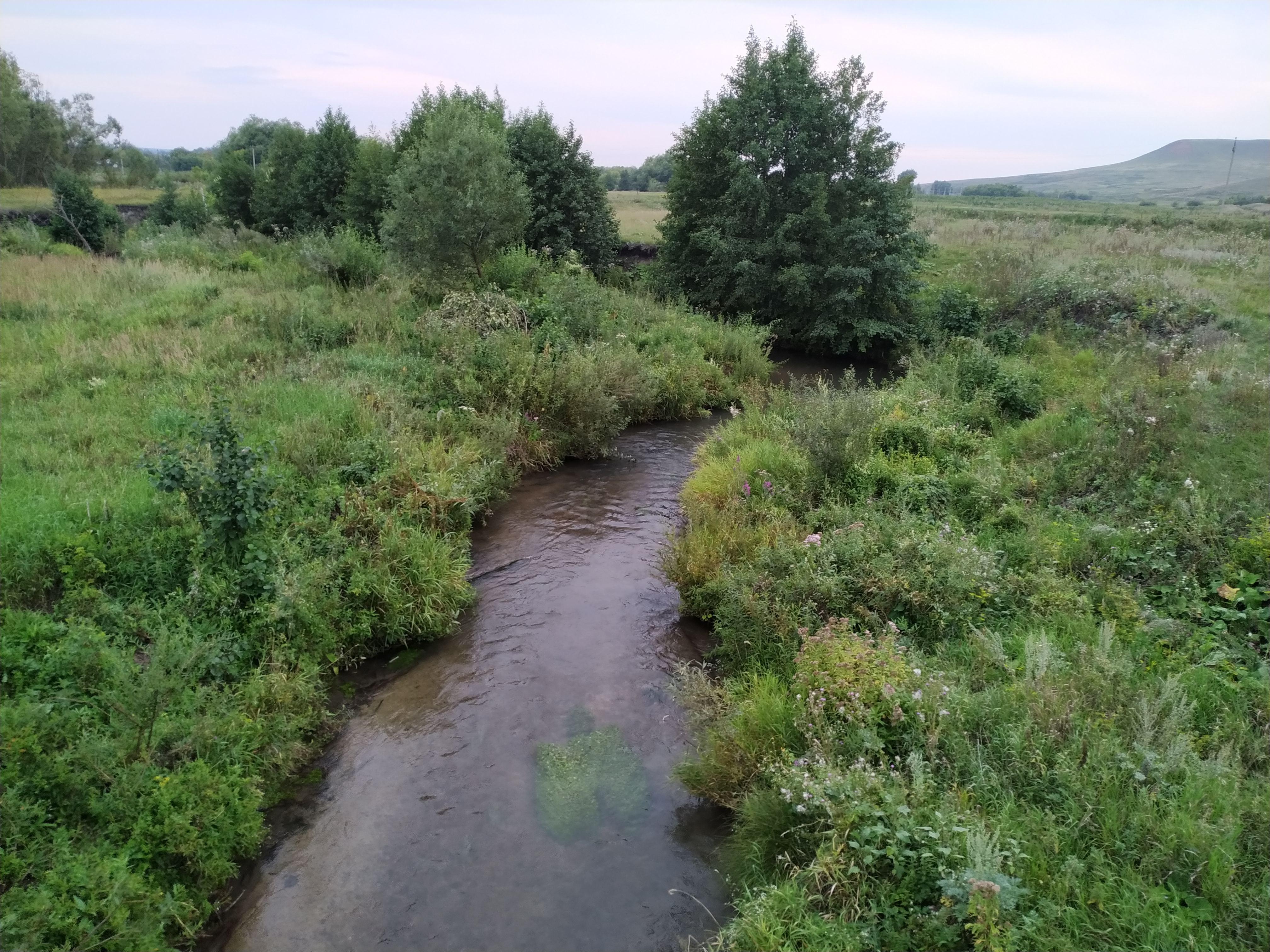 Река Шунгут недалеко от Старого Якушкина, Сергиевский район Самарской области